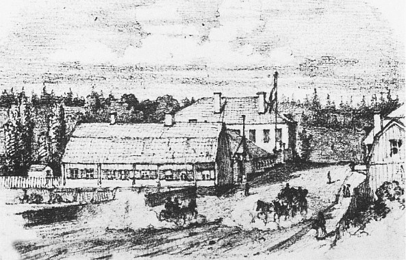 Clas på hörnet, illustration